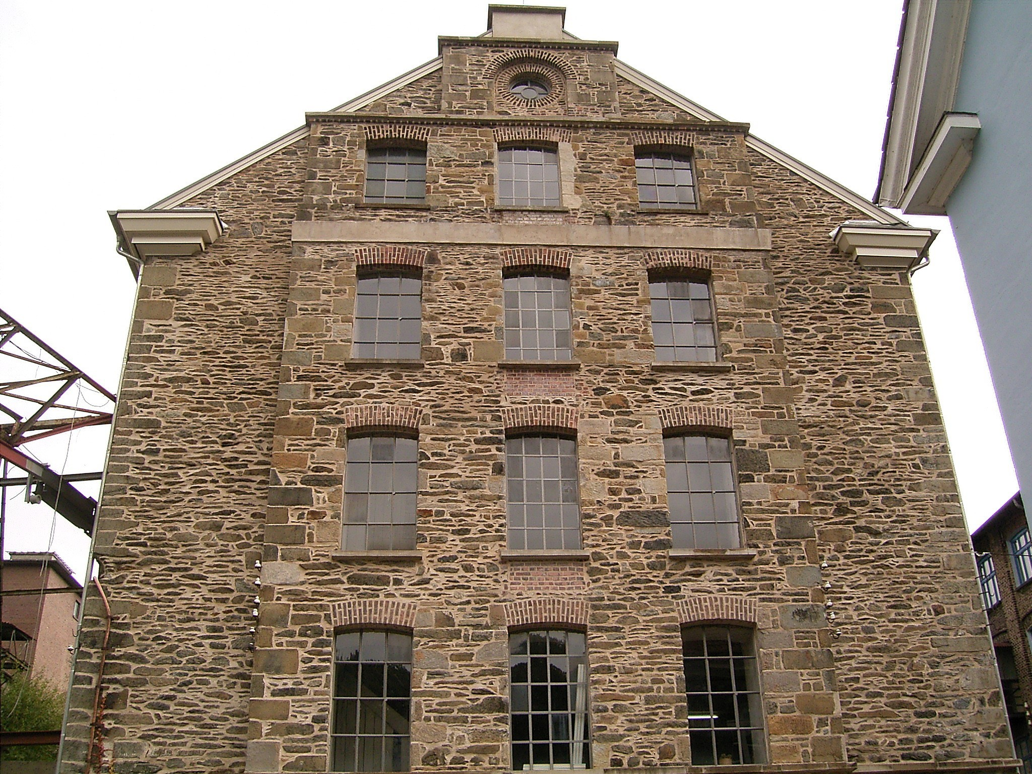 Radevormwald